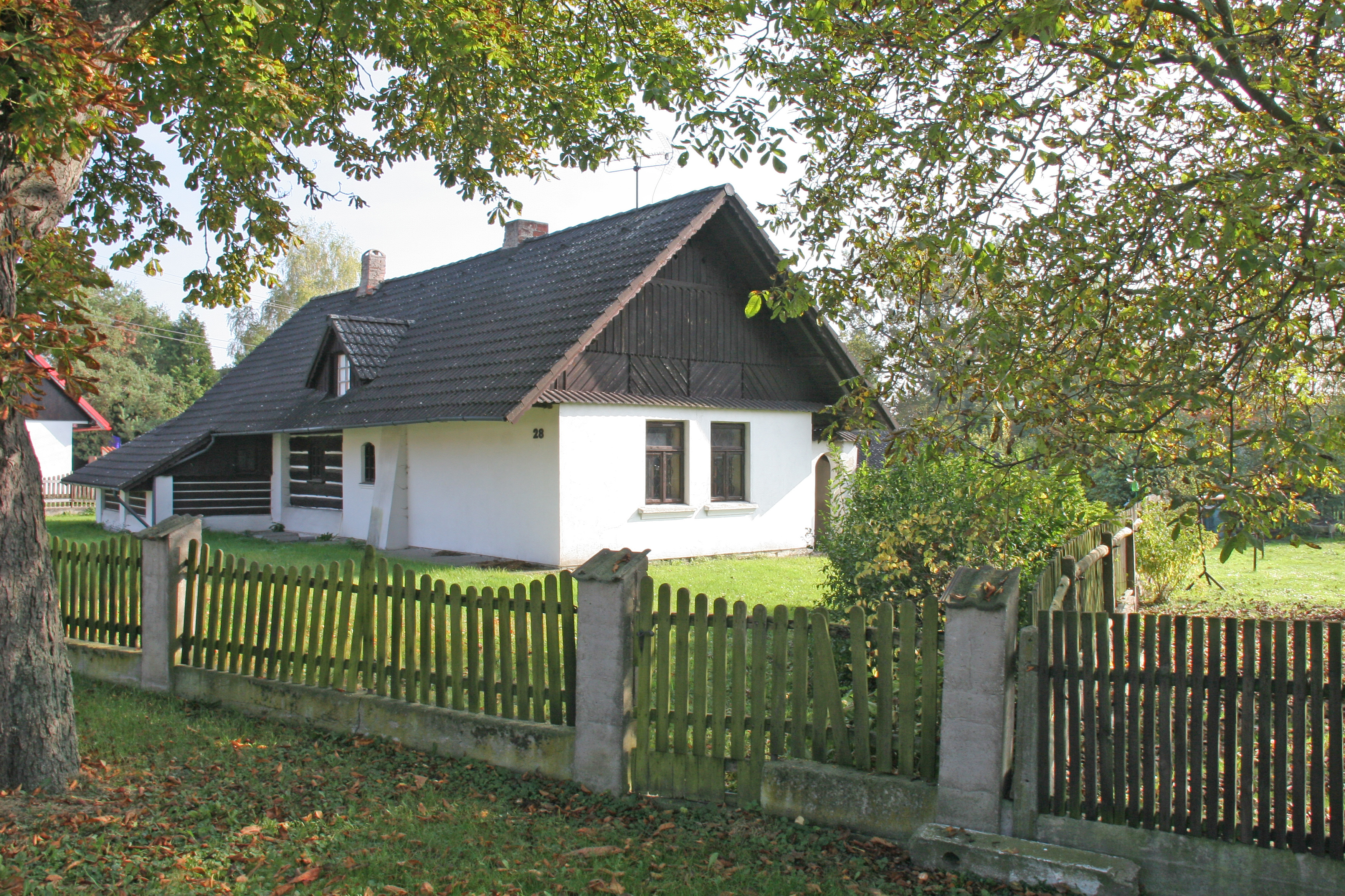 Skochovice 28